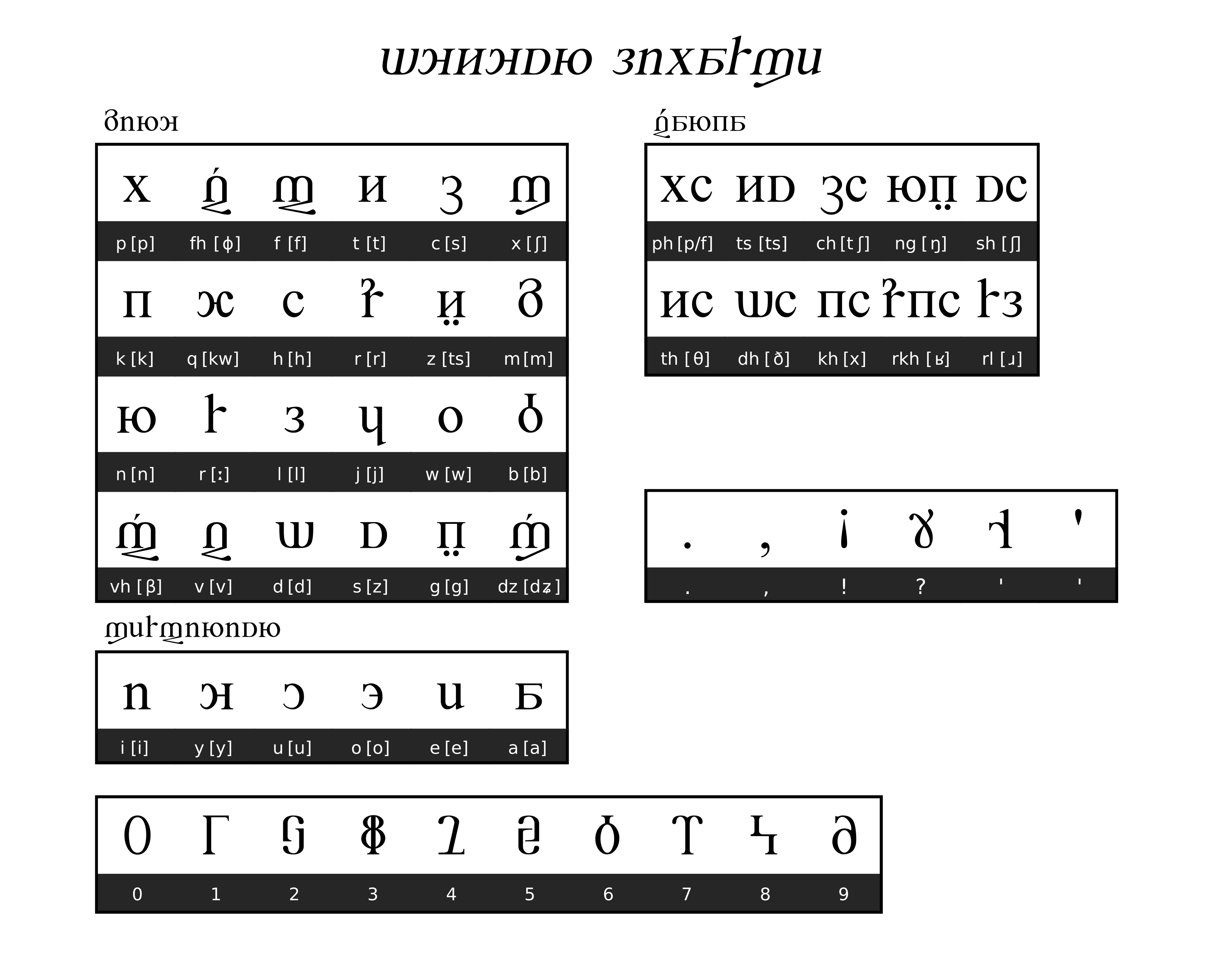 デュテュスン・リパーシェ（リパライン語に使う文字）の一覧表。